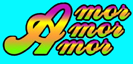 Logotipo de Amor, amor, amor (programa de farándula de Frecuencia Latina) durante la emisión en el 2014.